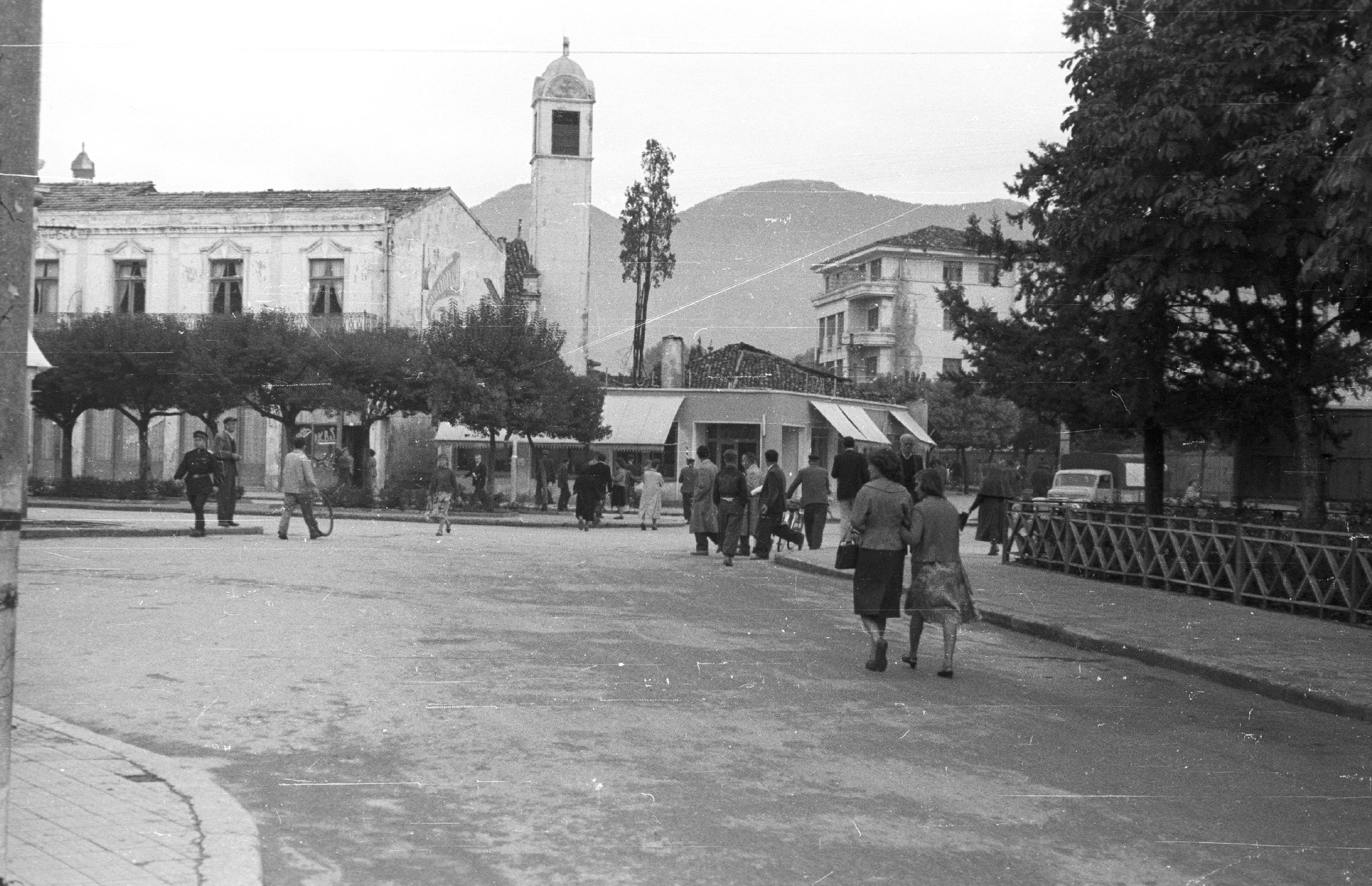 Sheshi Skenderbej (Szkander bég tér), az egykori városháza sarkától a később lebontott ortodox katedrális felé nézve. Location: Albania Tags: street view Title: Sheshi Skenderbej (Szkander bég tér), az egykori városháza sarkától a később lebontott ortodox katedrális felé nézve.